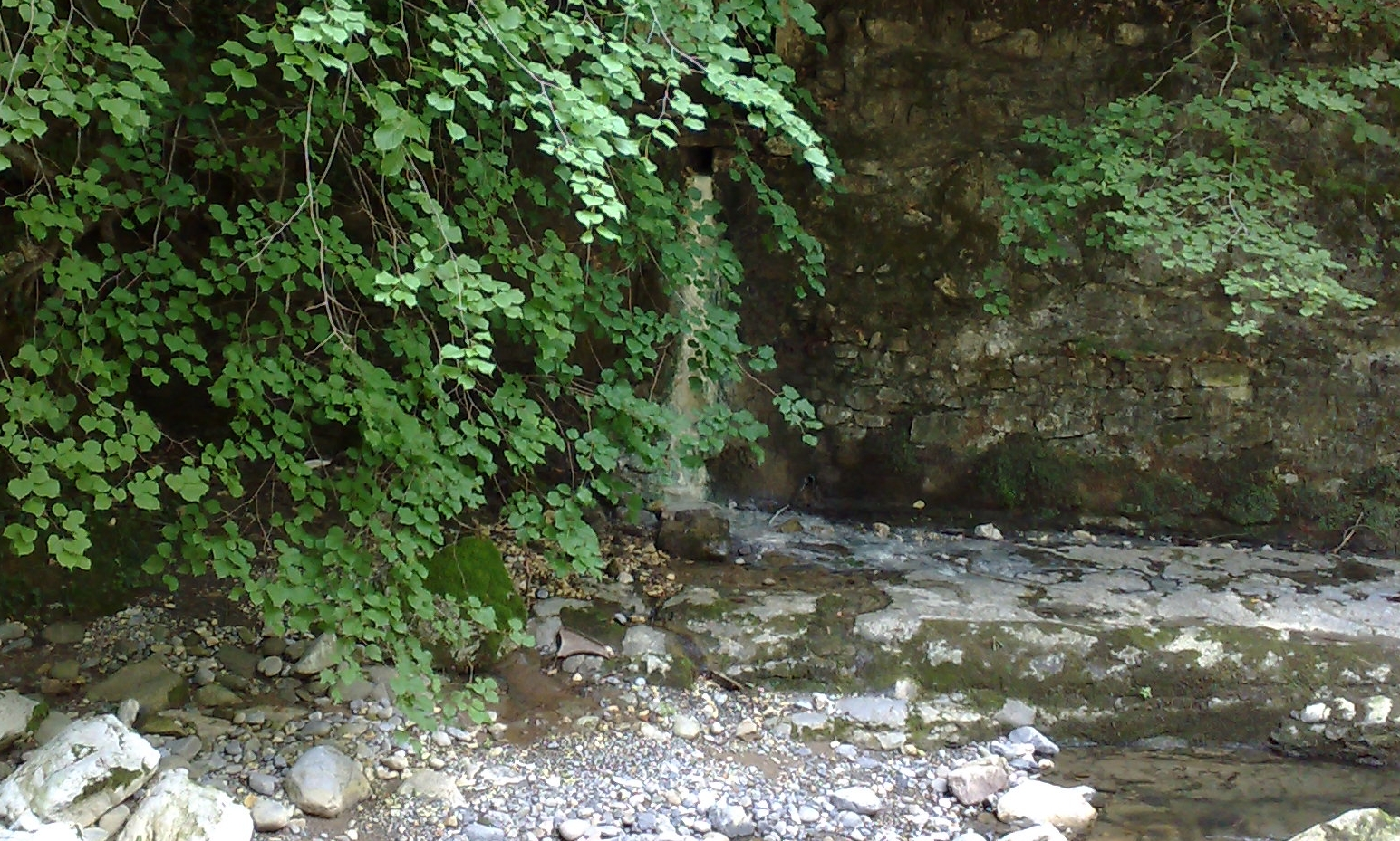 Exsurgence de l'une des sources sulfureuses des anciens bains de la Caille en Haute-Savoie, France.